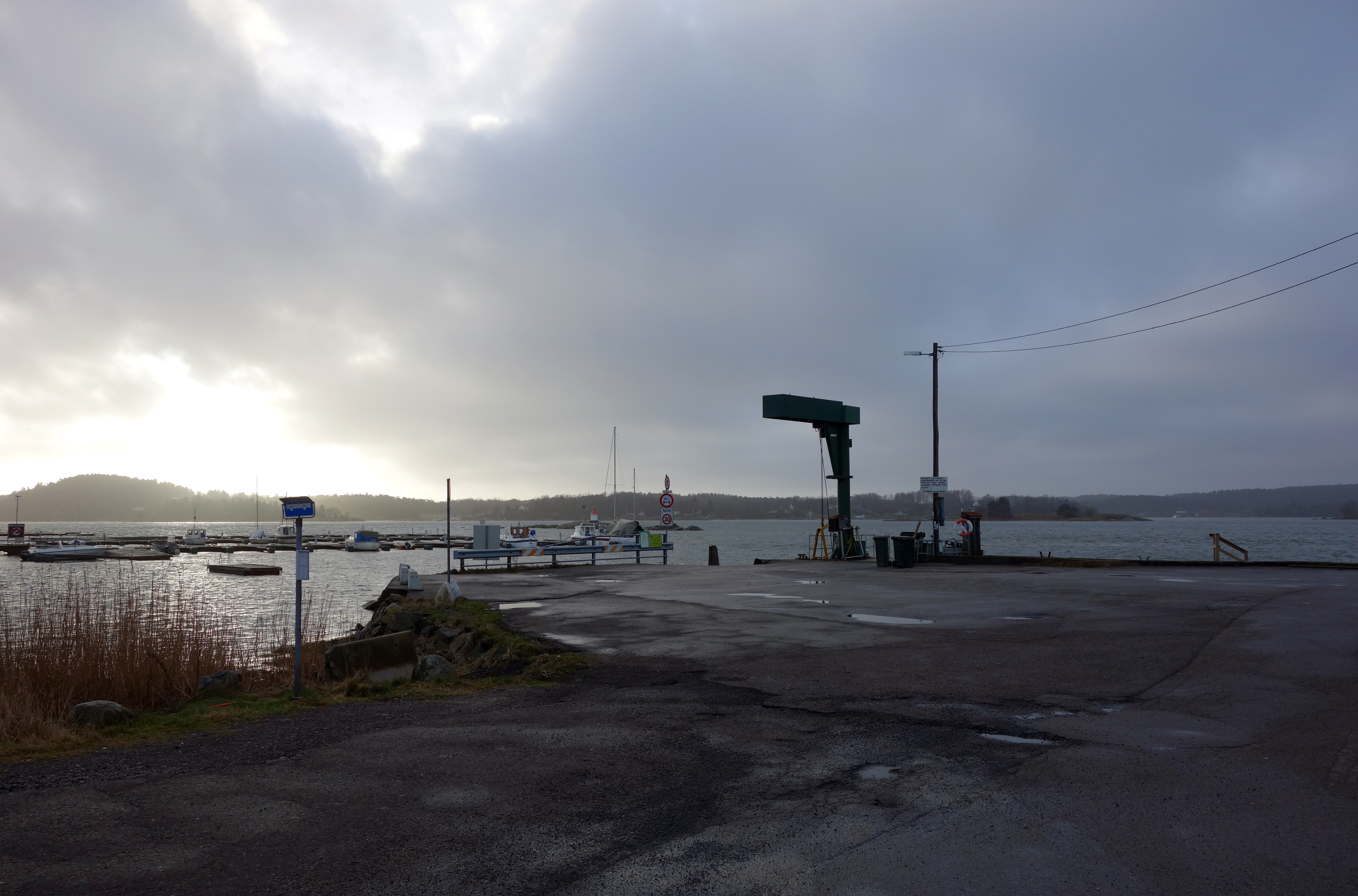 Kaia på Tenvik på Nøtterøy i Vestfold. Veierland ses i bakgrunnen.